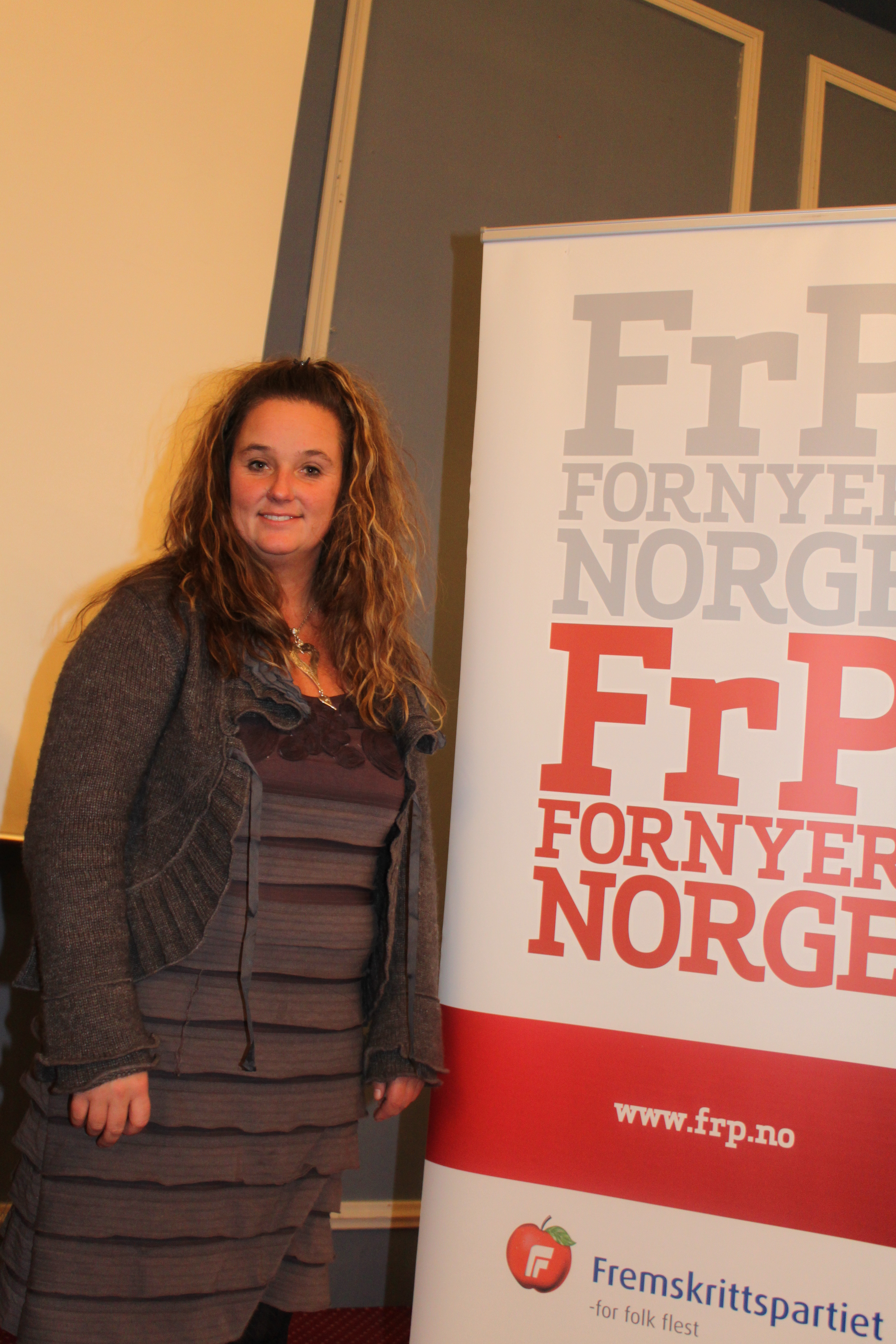 Foto: Lars Åge Kamfjord/Vestfold FrP